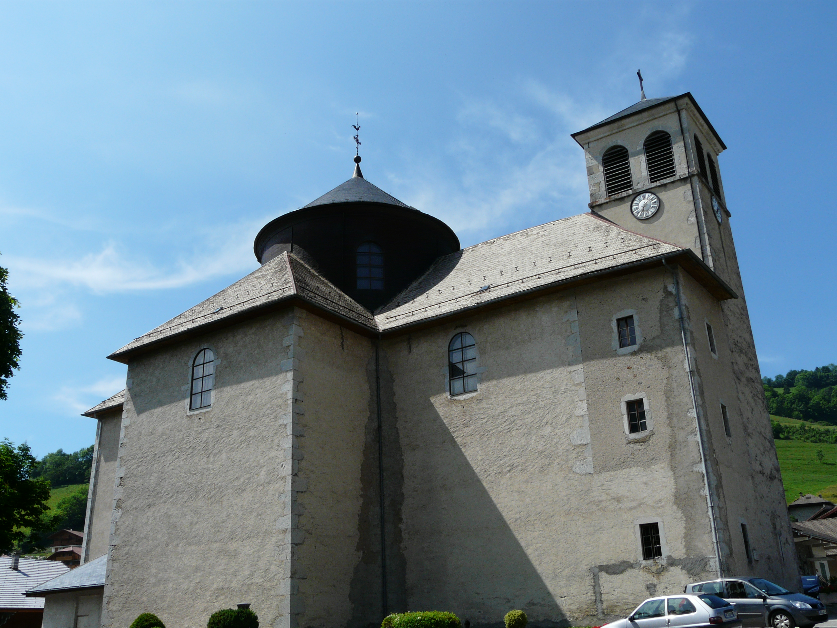 L'église de Bernex (Haute-Savoie)